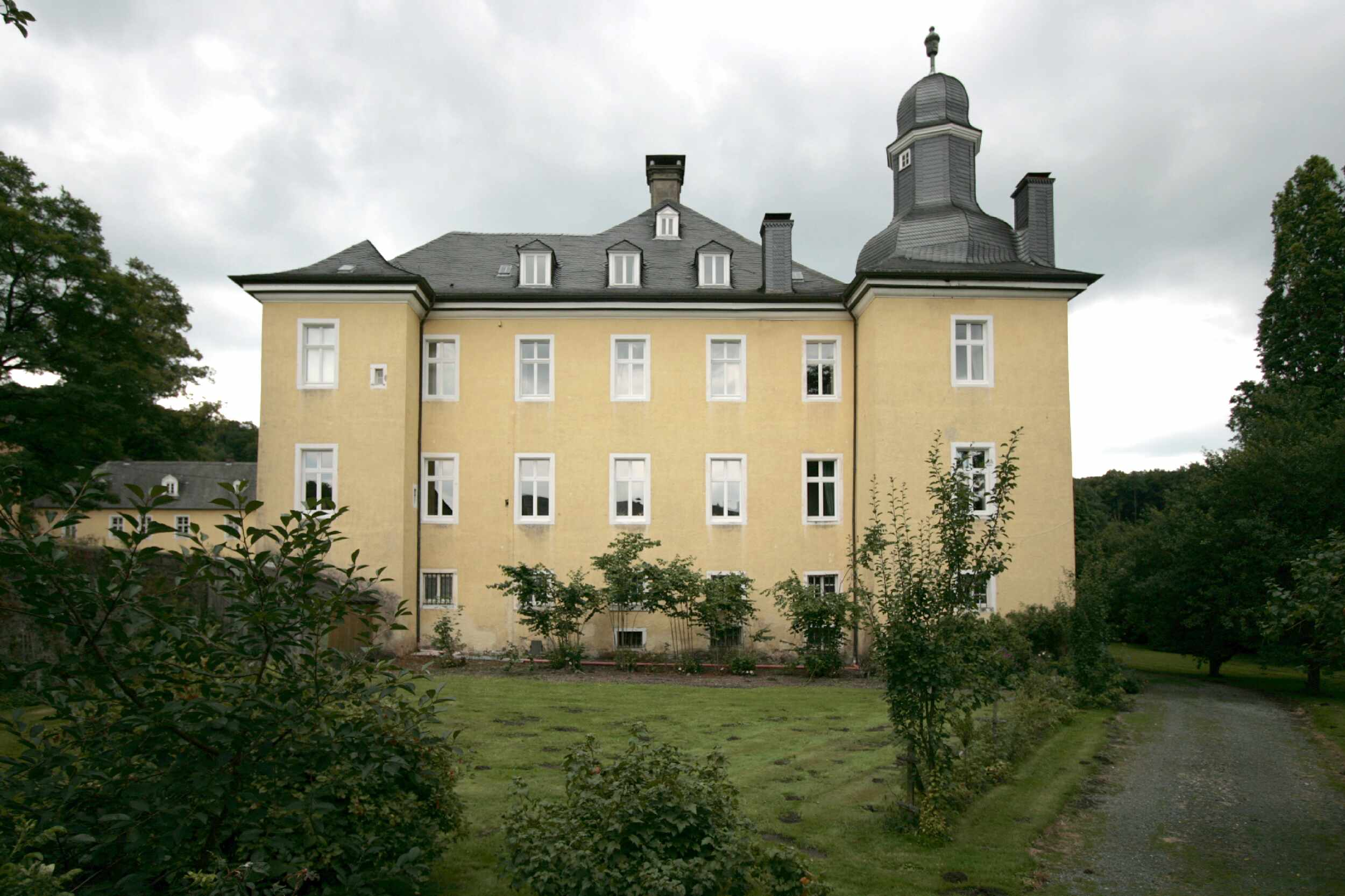 Beschreibung: Schloss Antfeld Olsberg Seitenansicht, Quelle: Eigenes Foto Urheber: Wolfgang Poguntke Aufnahmedatum : 12.07.2008